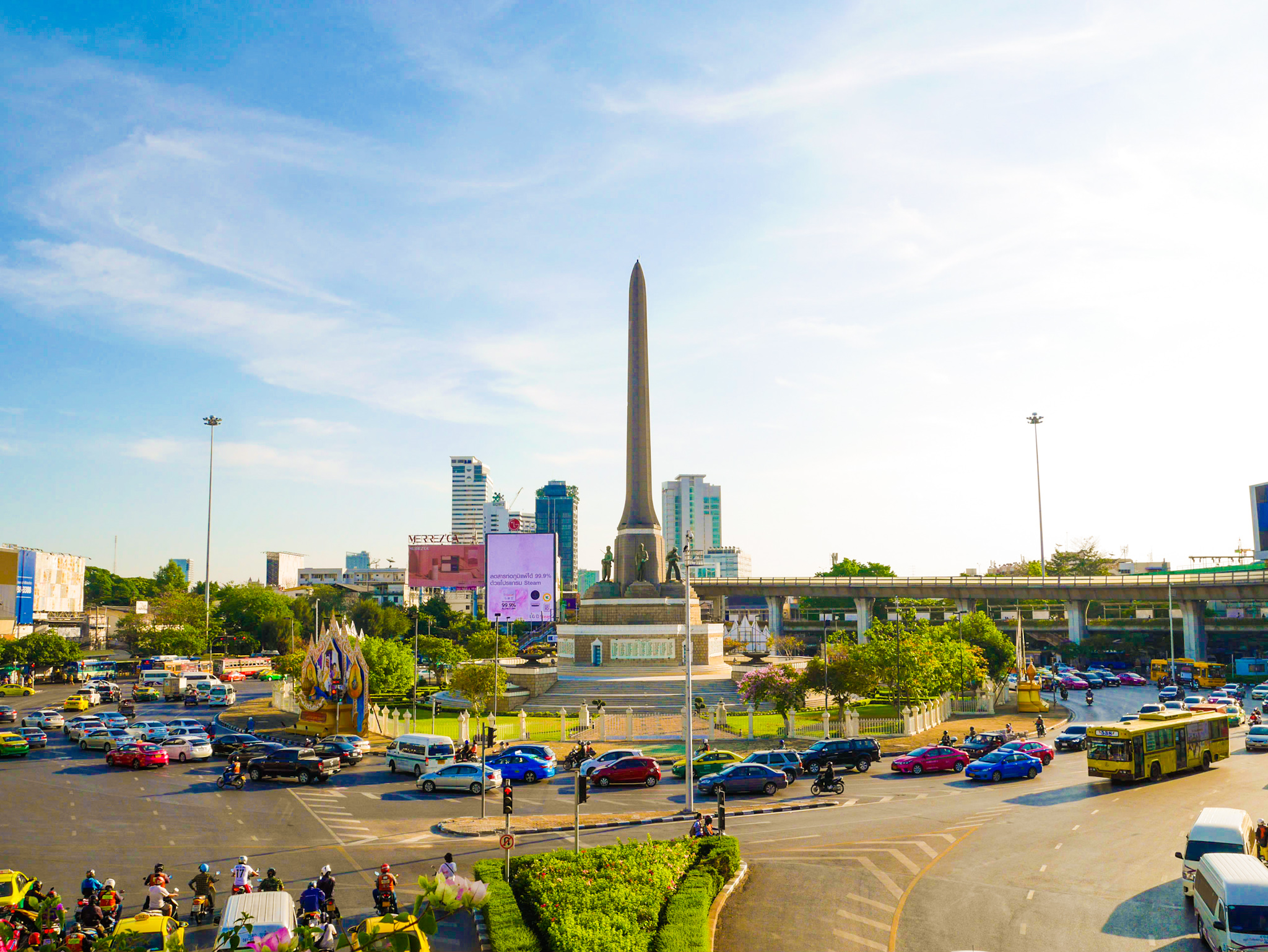 อนุสาวรีย์ชัยสมรภูมิ